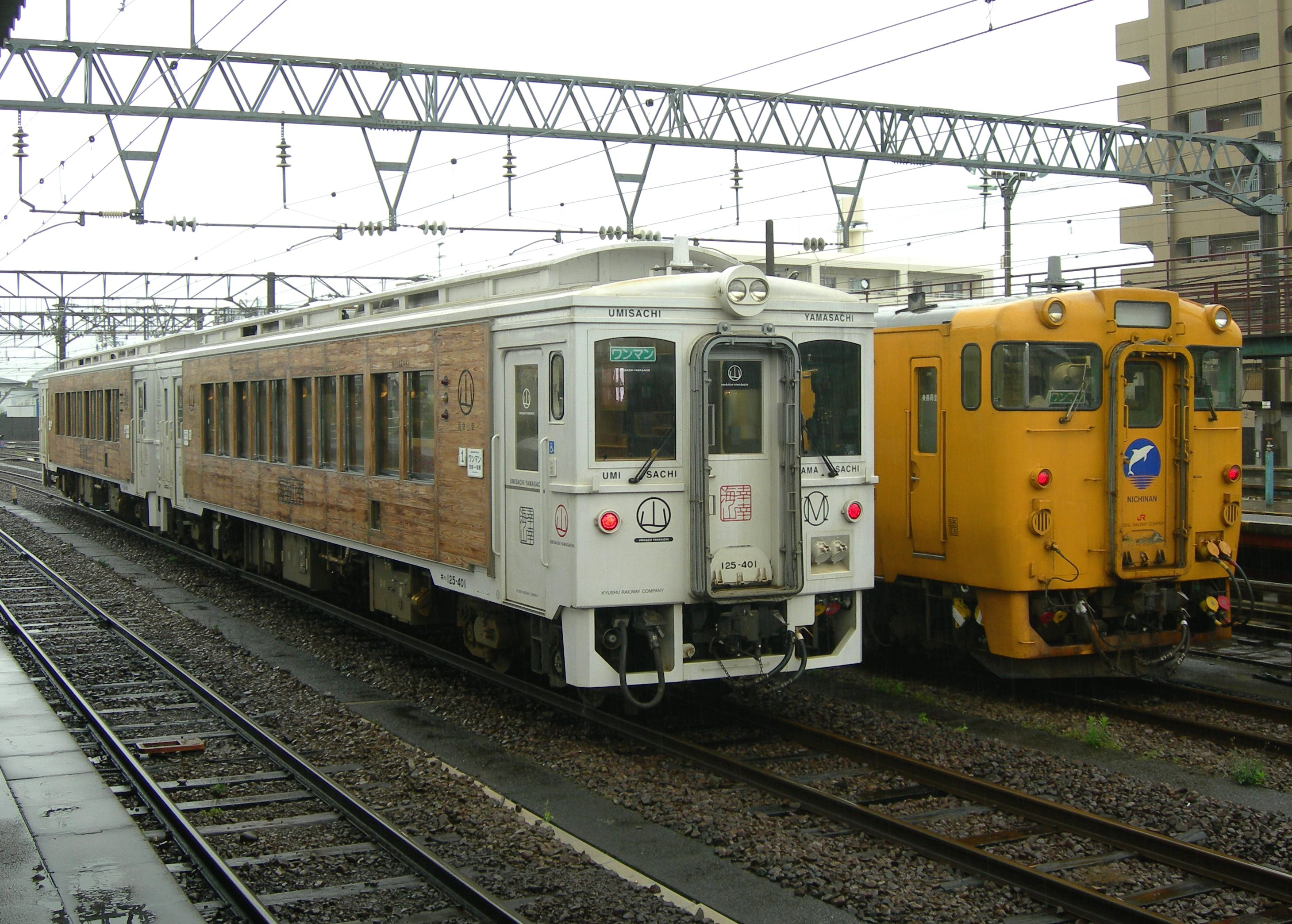 JR九州キハ125形気動車「海幸山幸」とキハ40形8000番台「日南線色」